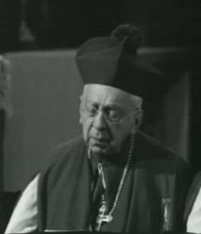 mgr. Johannes P. Huibers, bisschop van Haarlem.